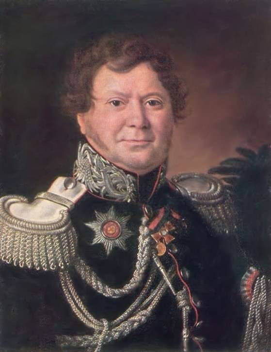 Портрет Н.Н.Муравьёва 1817 г, холст, масло, 82 х 70 cмГосударственный исторический музей, Москва